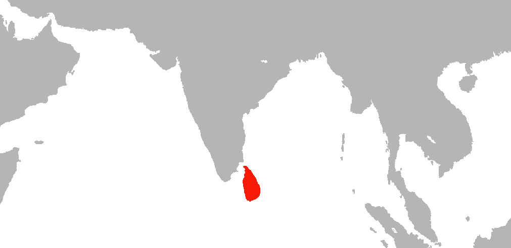 Carte de répartition du macaque à Toque, Macaca sinica. Etablie par Christophe Chauvin.